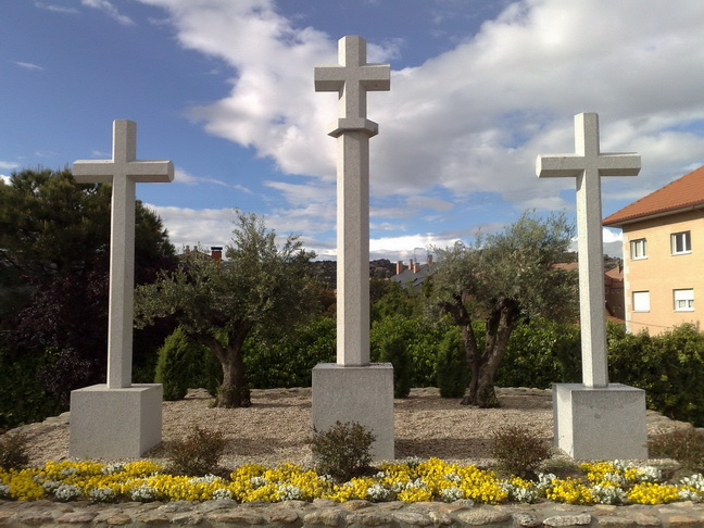 Tres Cruces situadas en la salida del pueblo de Torrelodones por la calle Camino de Valladolid